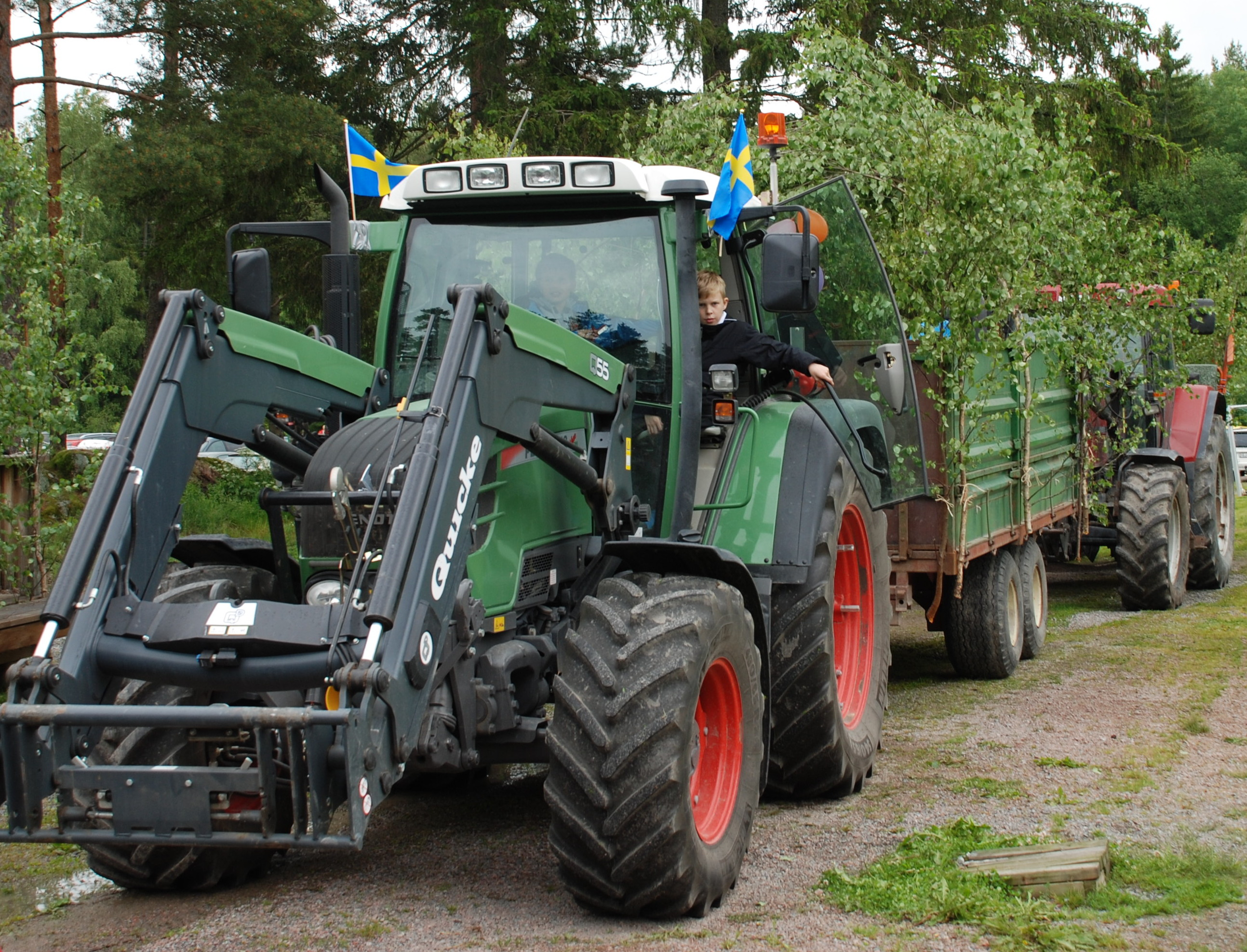 Fendt Vario traktor med lövad skrinda i Lagga